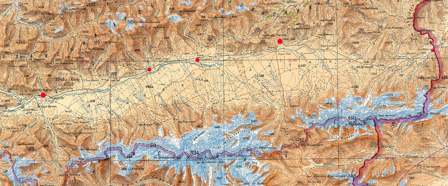 Карта Алайской долины